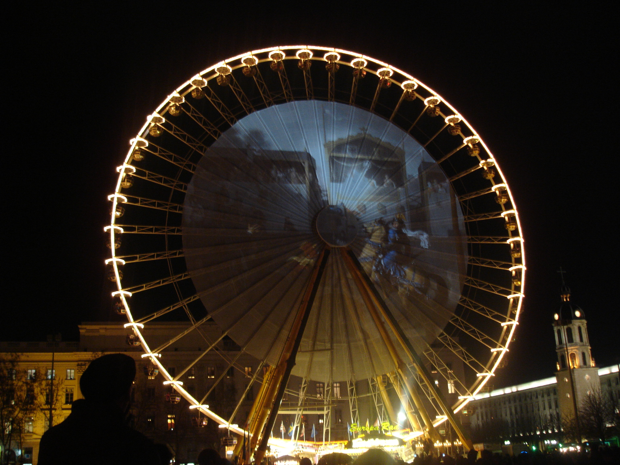 Lyon Bellecour : la grande roue le 8 décembre 2009